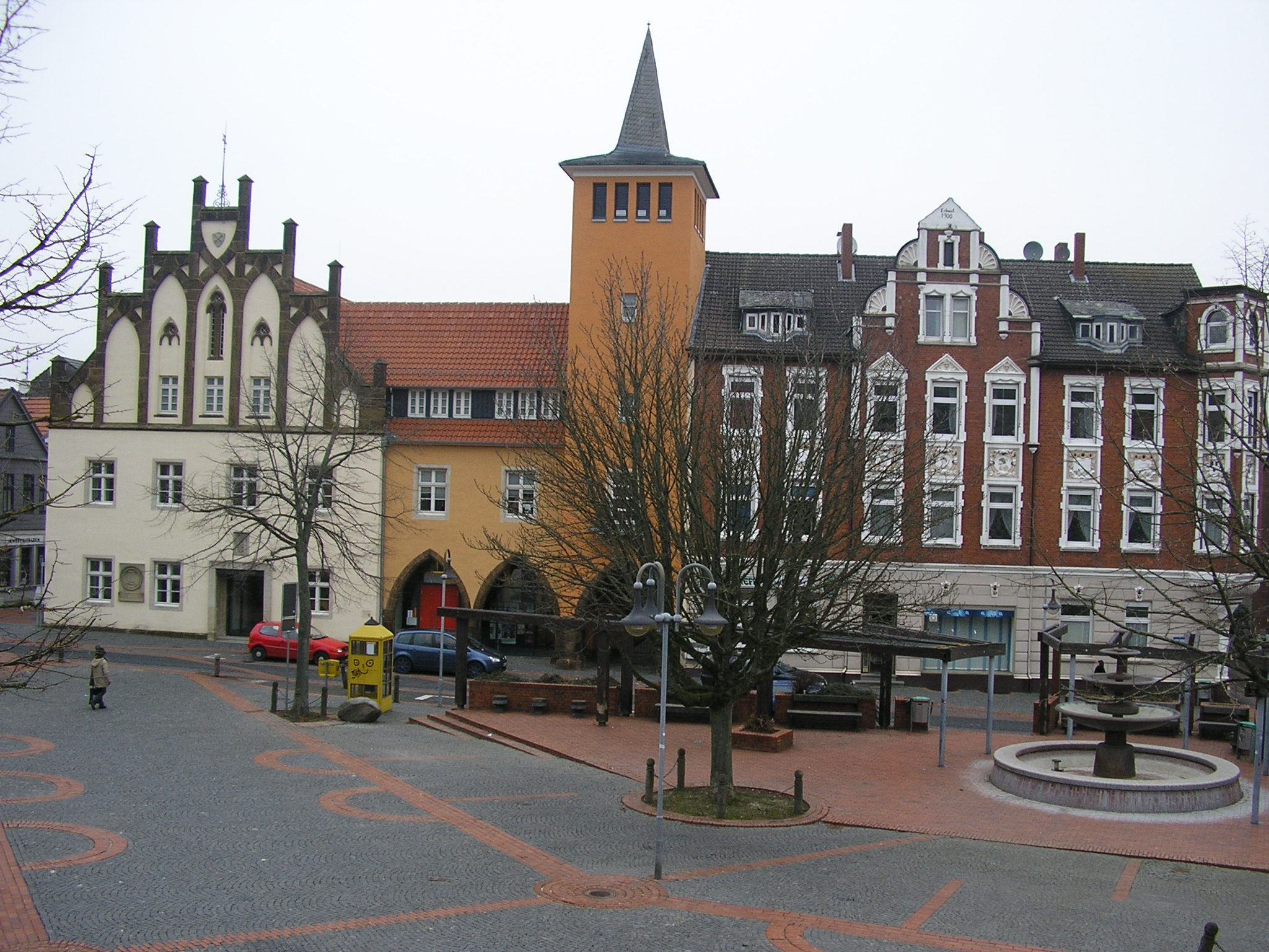 Marktplatz in Lübbecke This image shows a heritage building in Germany, located in the North Rhine-Westphalian city Lübbecke (no. 013). This image shows a heritage building in Germany, located in the North Rhine-Westphalian city Lübbecke (no. 100).